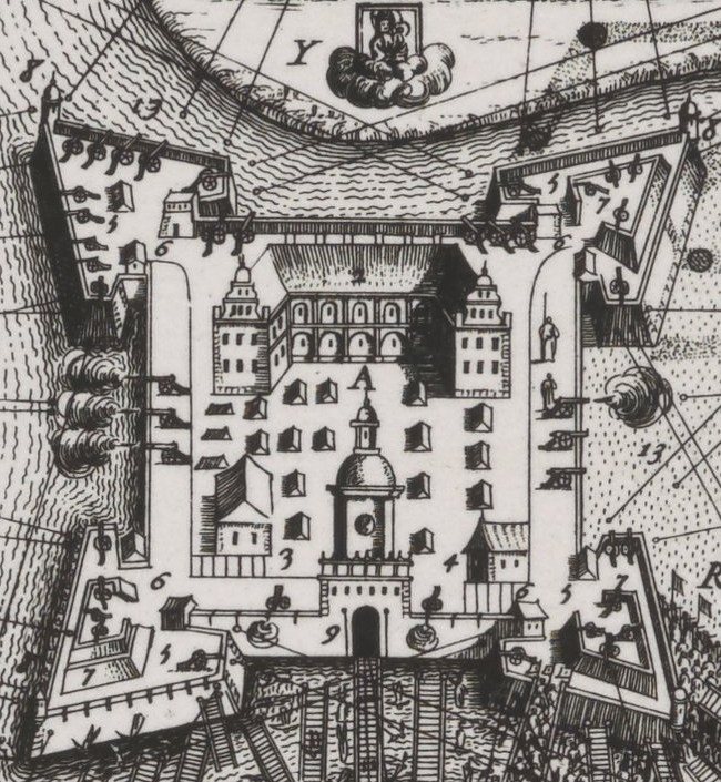 Беларуская (тарашкевіца): Ляхавічы (Lachavičy). Замак